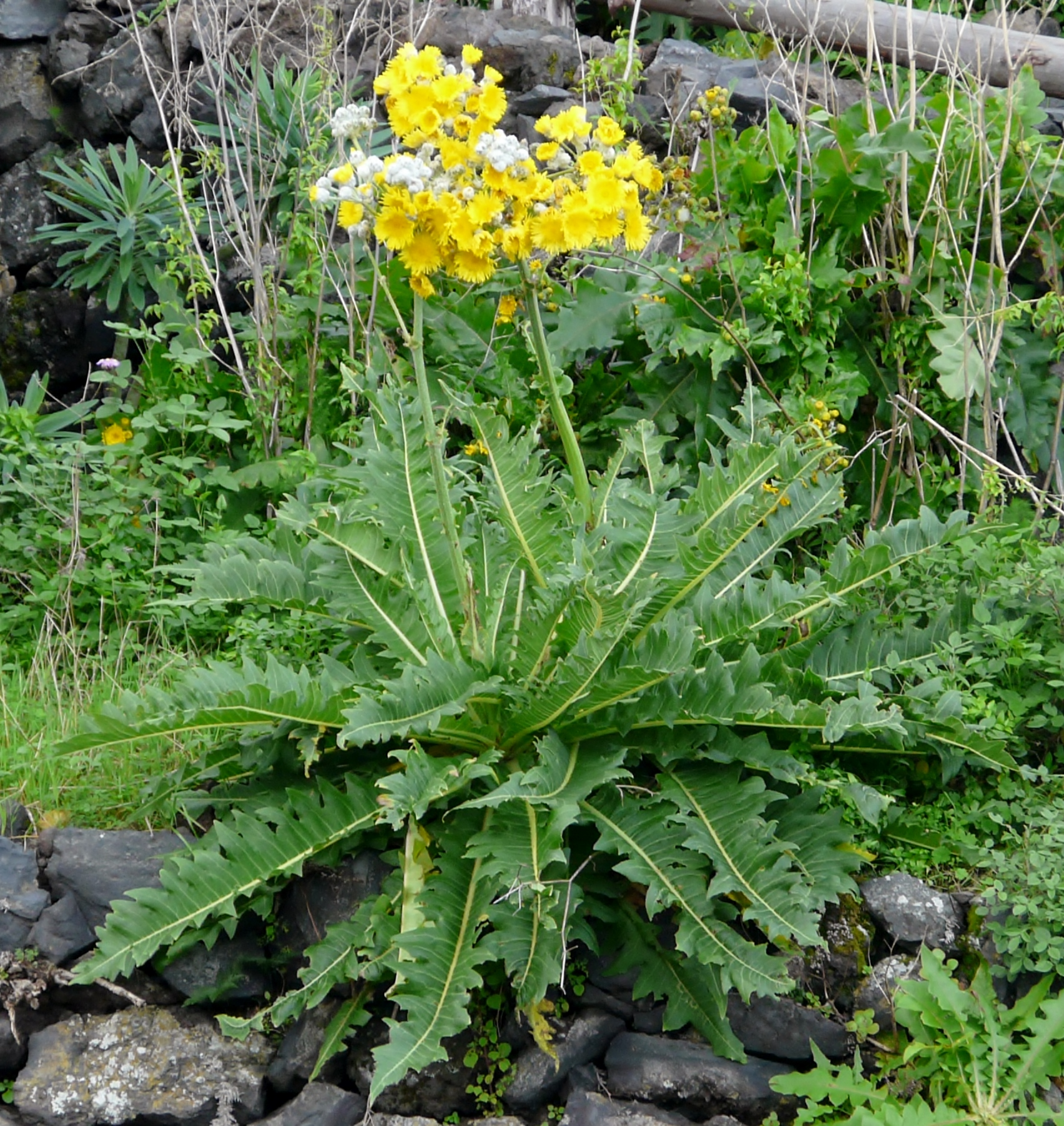 Obtenida en el Norte de Tenerife, ejemplar completo en floración